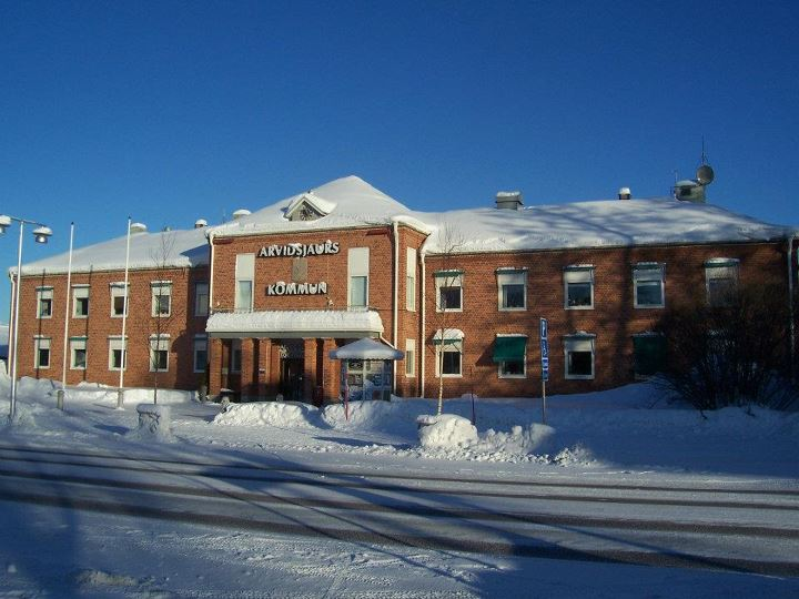 Municipio di Arvidsjaur / Arvidsjaur Town Hall